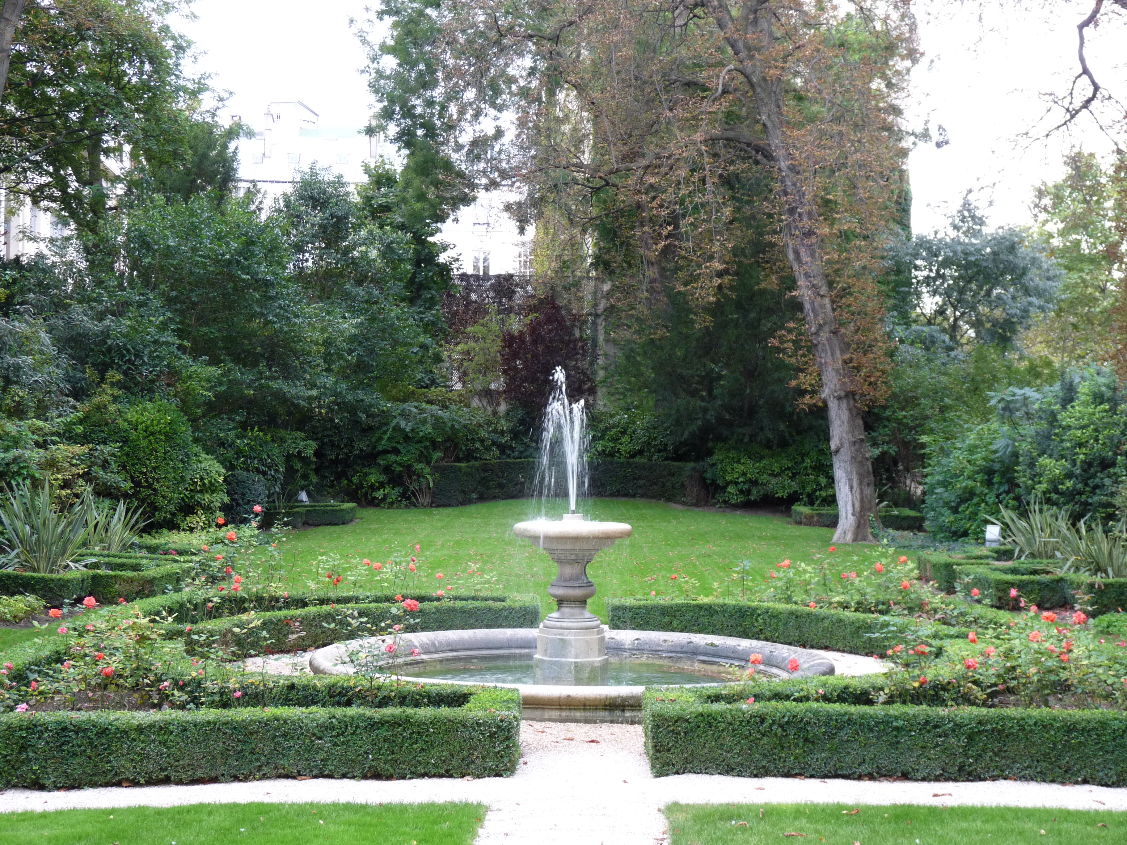 Le jardin du hôtel du Châtelet, Paris. Photo prise lors des journées du patrimoine 2011.